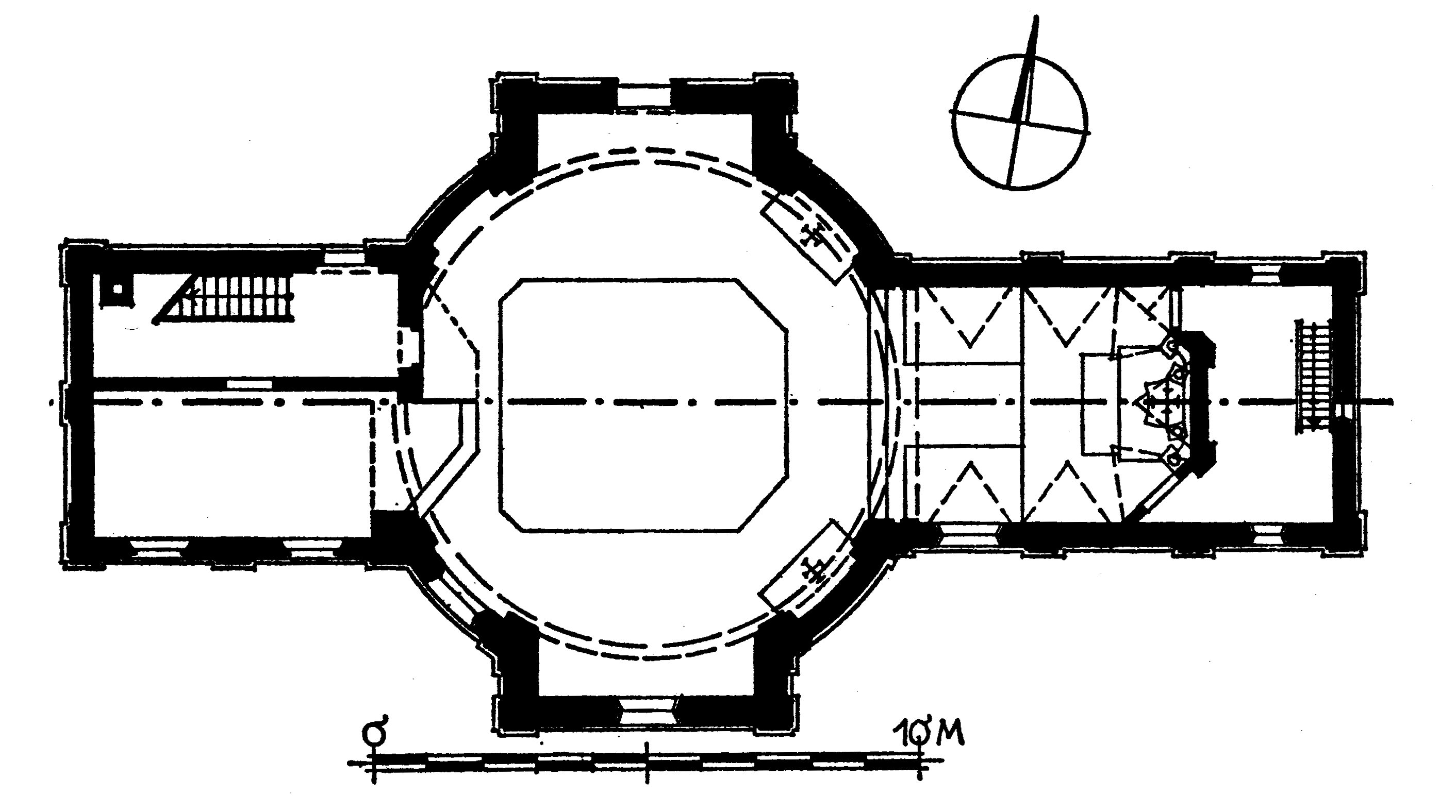 Grundriss von St. Antonius von Padua in Schnerzhofen, Markt Wald